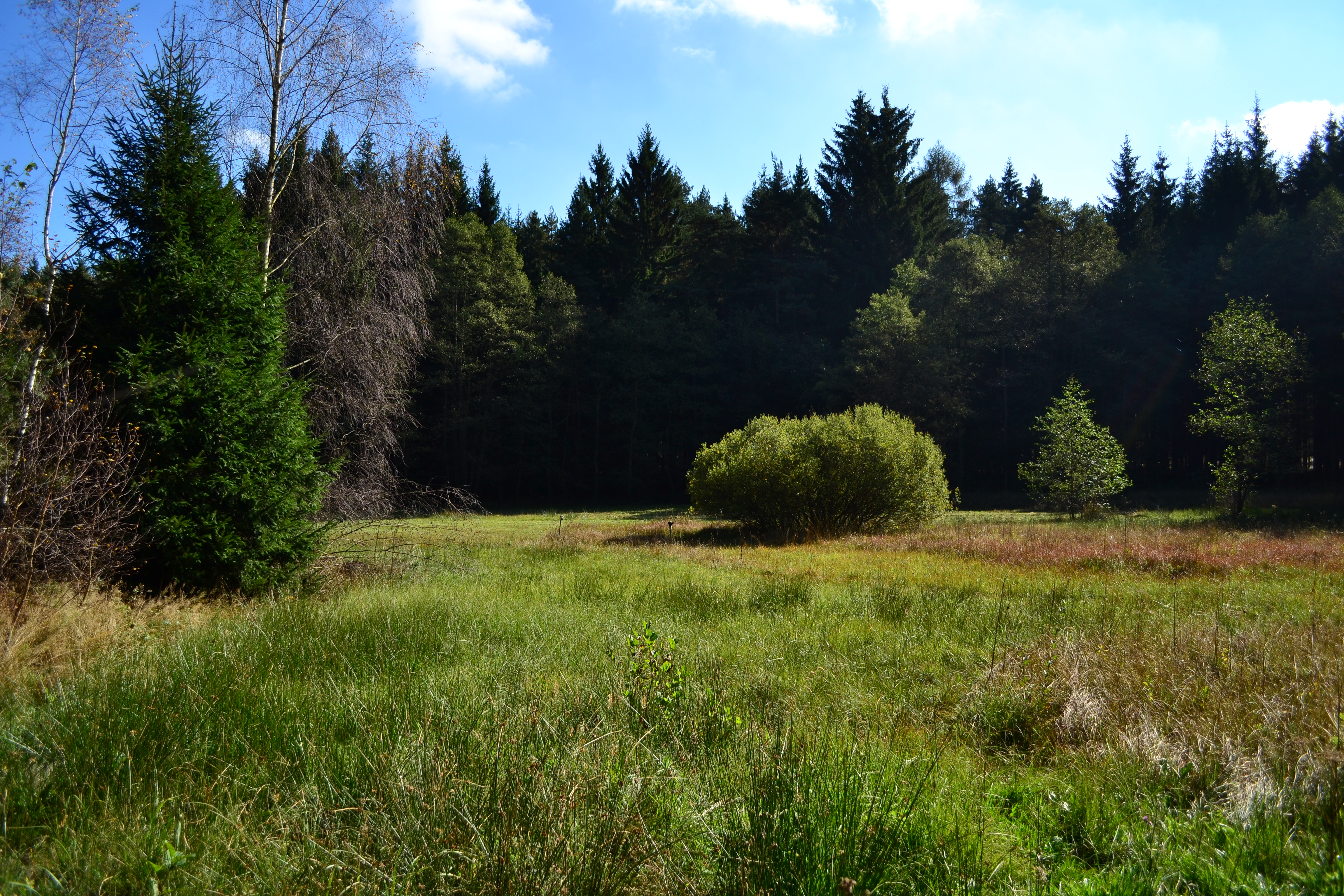 Prameniště, louka